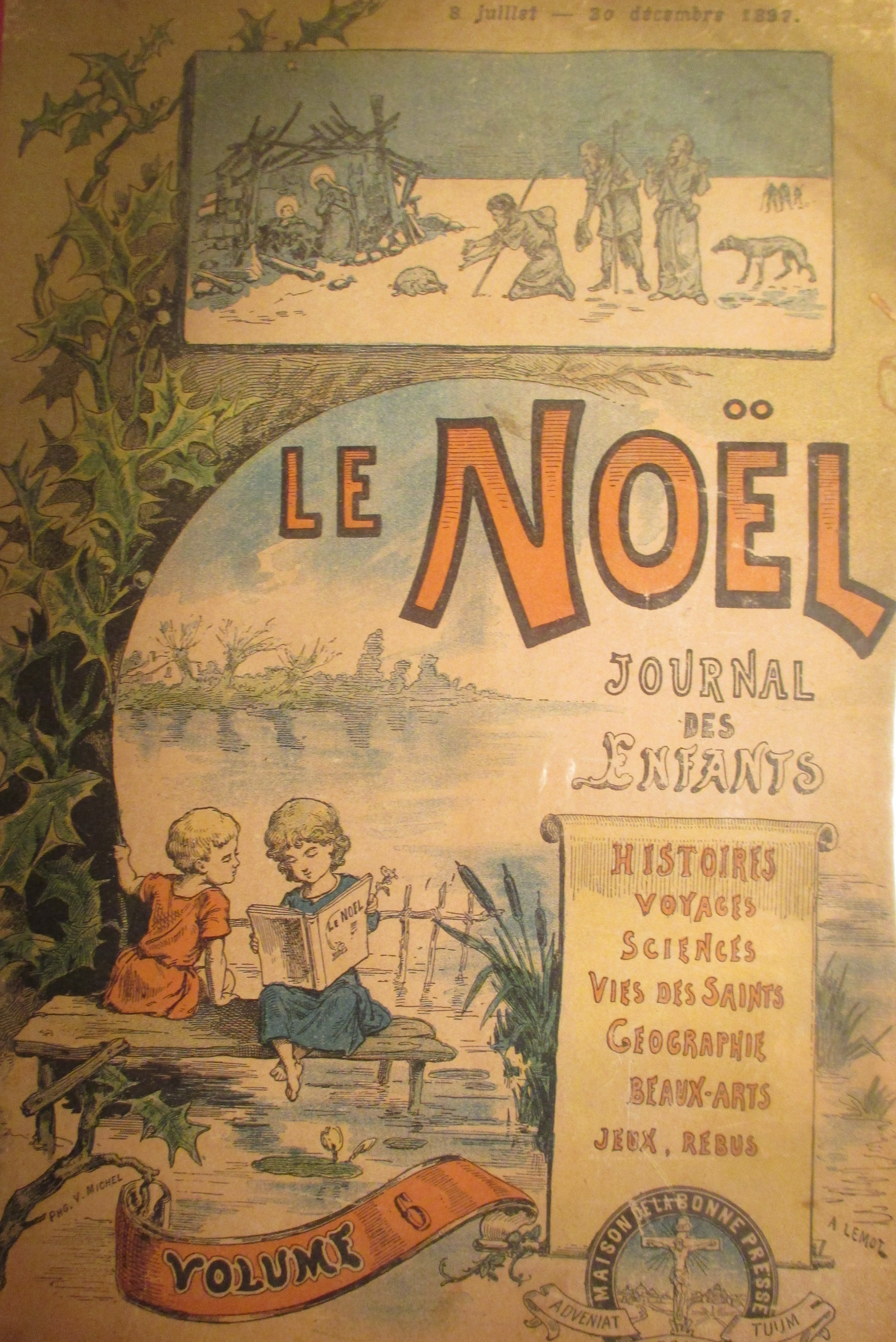 Le Noël, hebdomadaire pour enfants de la Maison de la Bonne Presse, fondée par les Pères assomptionnistes à Paris. Couverture du volume n°6 (2e semestre 1897). Ce journal a paru de 1895 à 1940.